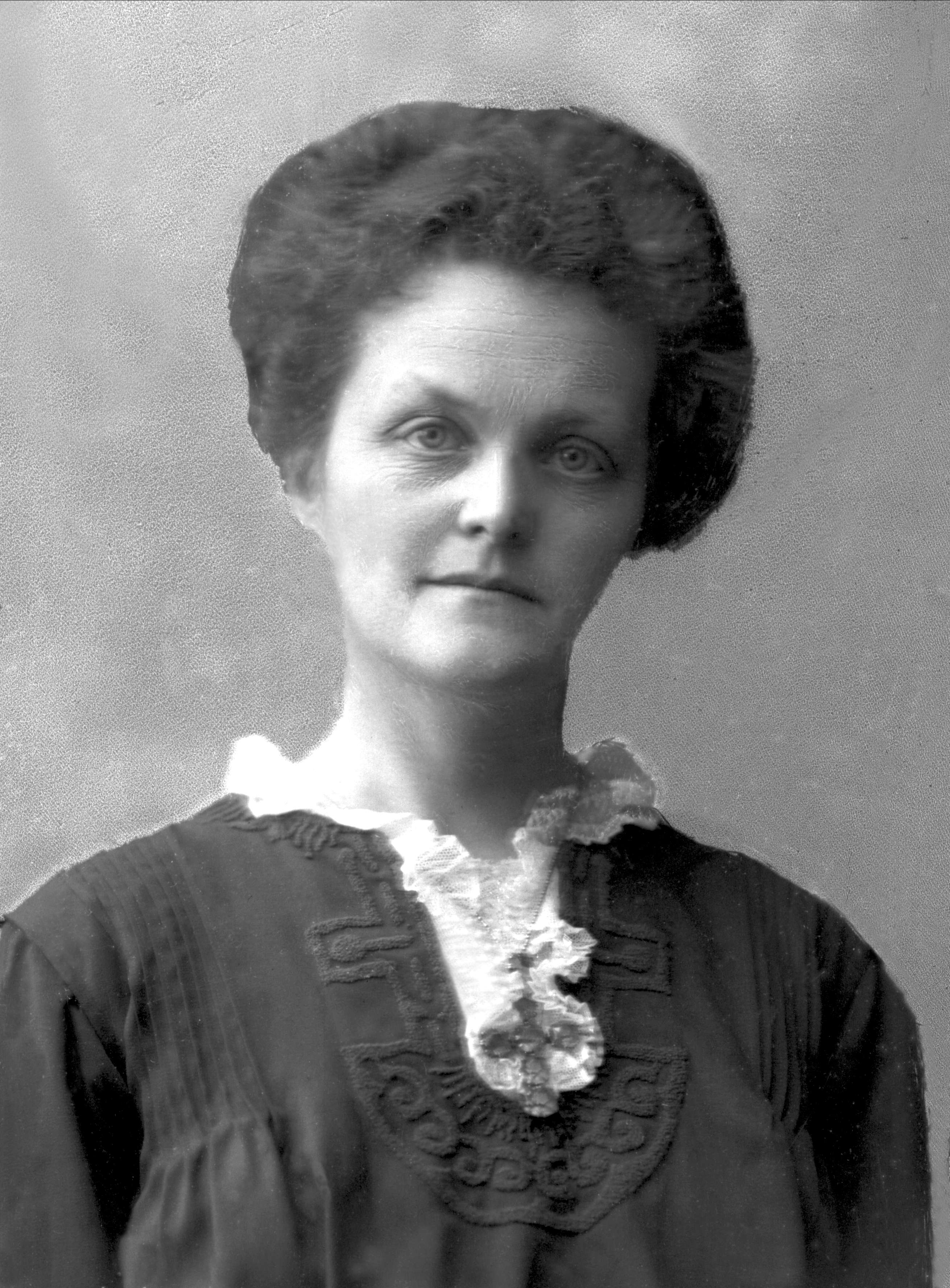 Ella Anker var en norsk journalist, utenrikskorrespondent, forfatter og kvinnesaksforkjemper.